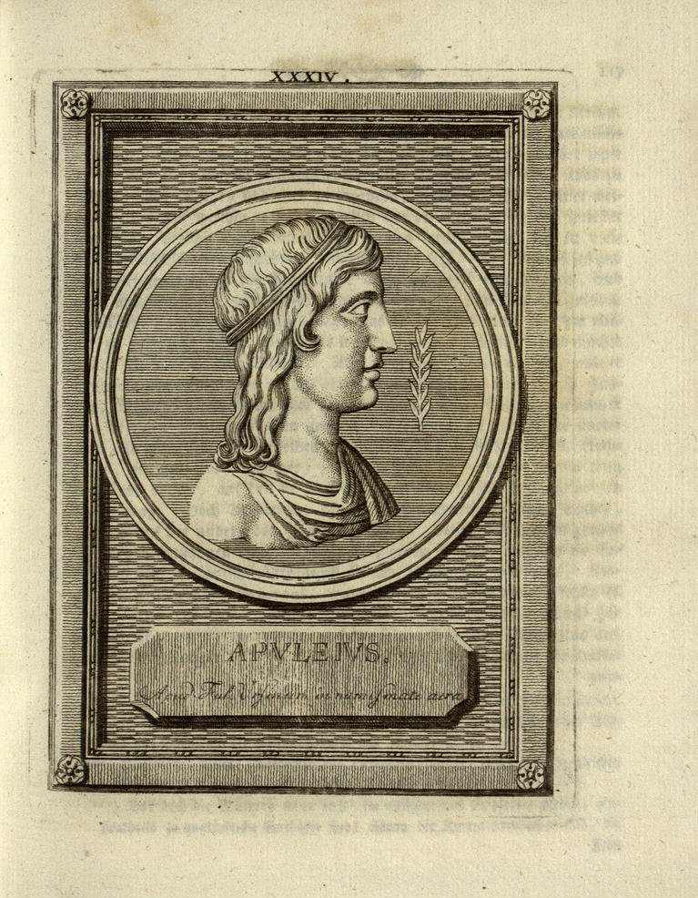 Apuleius